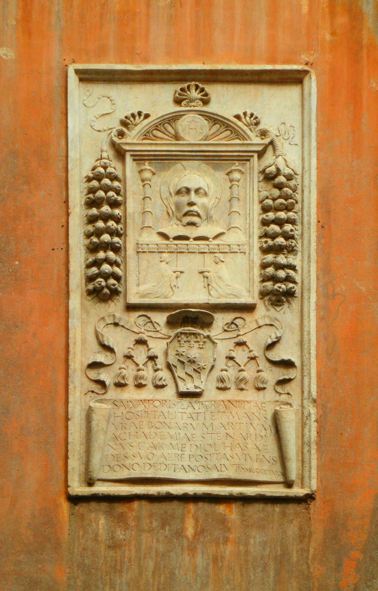 Roma, stemma dell'Arciconfraternita del SS. Salvatore (sopra) e del cardinale Stefano Nardini, ed epigrafe del dono di immobili a via del Governo vecchio, da lui destinati alla fondazione del Collegio Nardini (1480). L'epigrafe recita: "SALVATORIS LATERANI PIAE HOSPITALITATI ET MANSURAE BONARUM ARTIUM ACHADEMIAE STE(phanus) NARDINUS CAR(dinal) MEDIOLAN(ensis) HAS AEDES SUO AERE POSITAS VIVENS DONO DEDIT AN(n)O SALUTIS MCCCCLXXX"